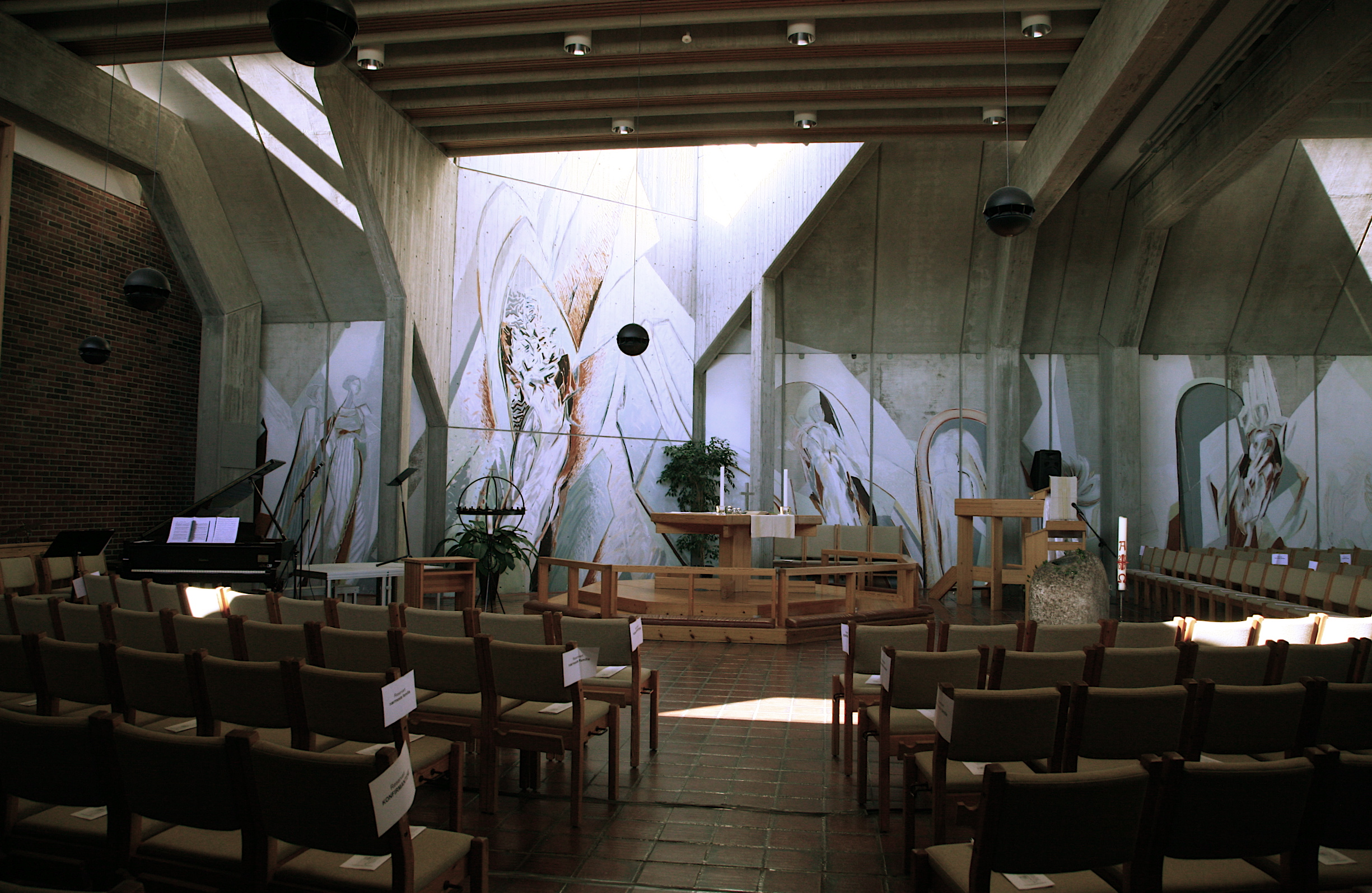 Sunde kirke interiør